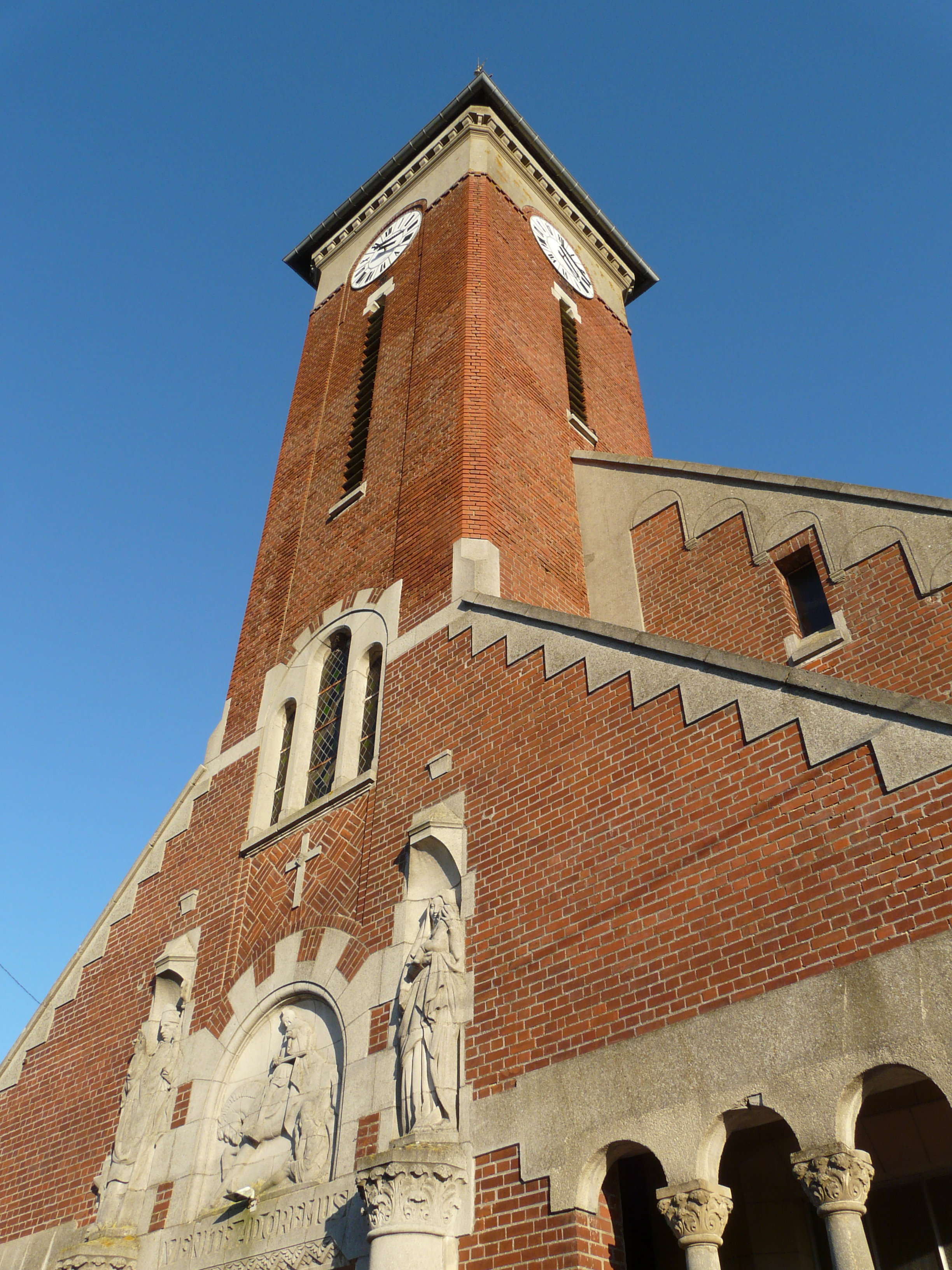 L'église d'Haynecourt